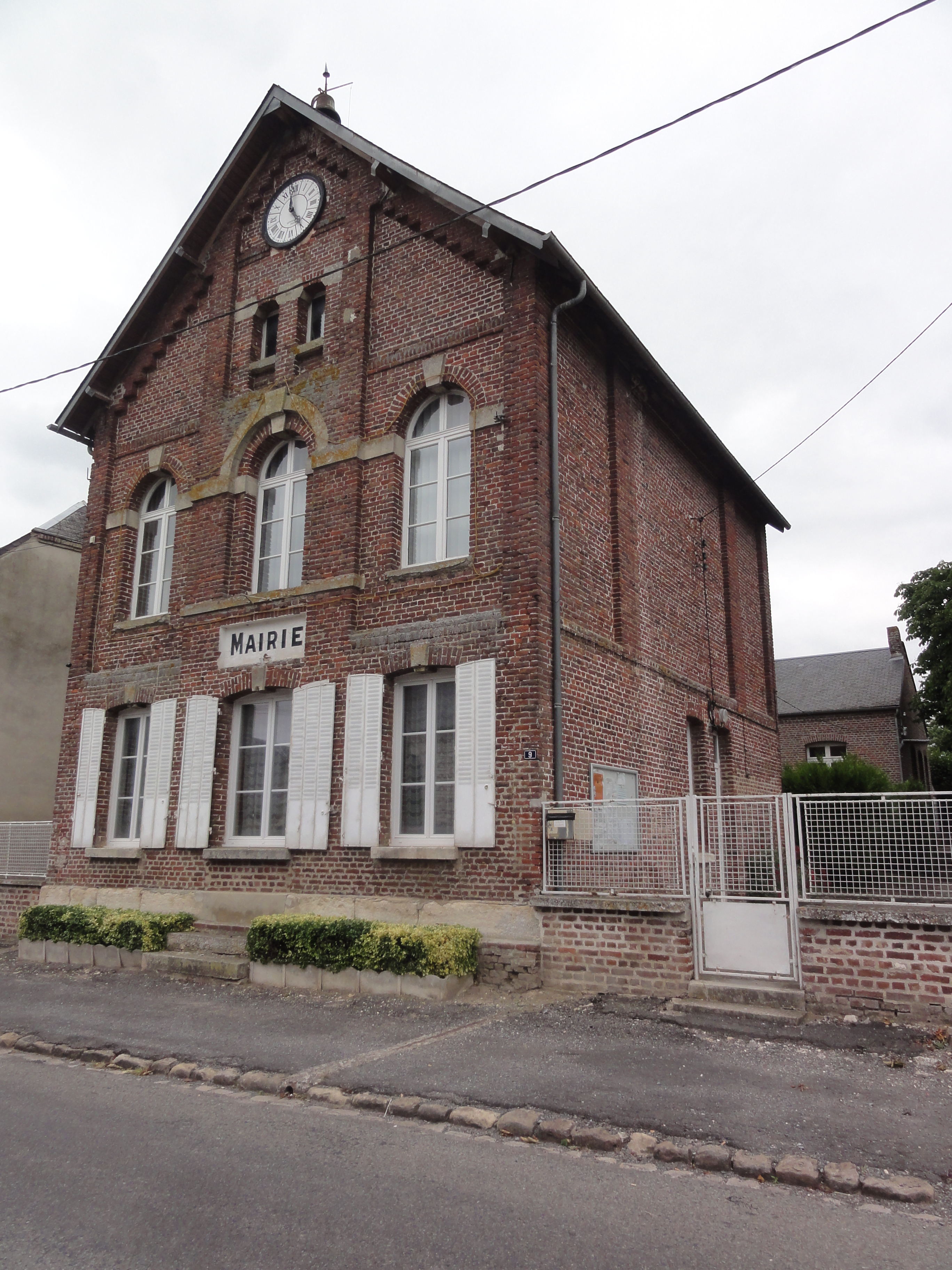 Toulis-et-Attencourt (Aisne) mairie